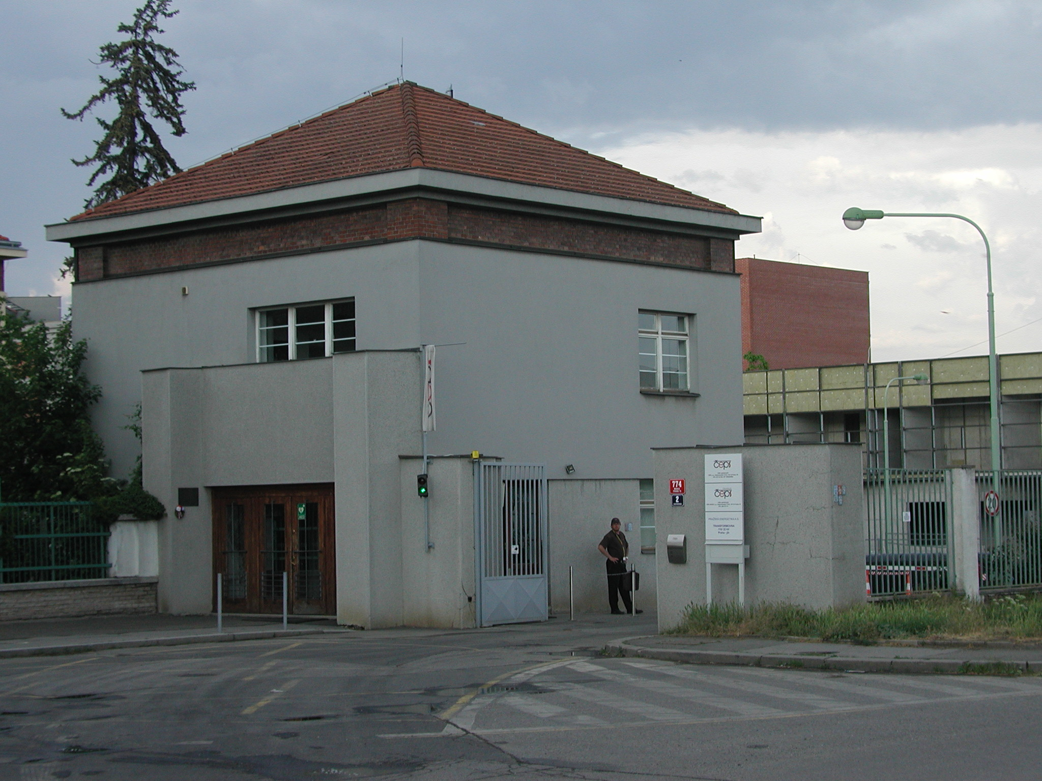 Praha - Michle, Elektrárenská 2, ČEPS